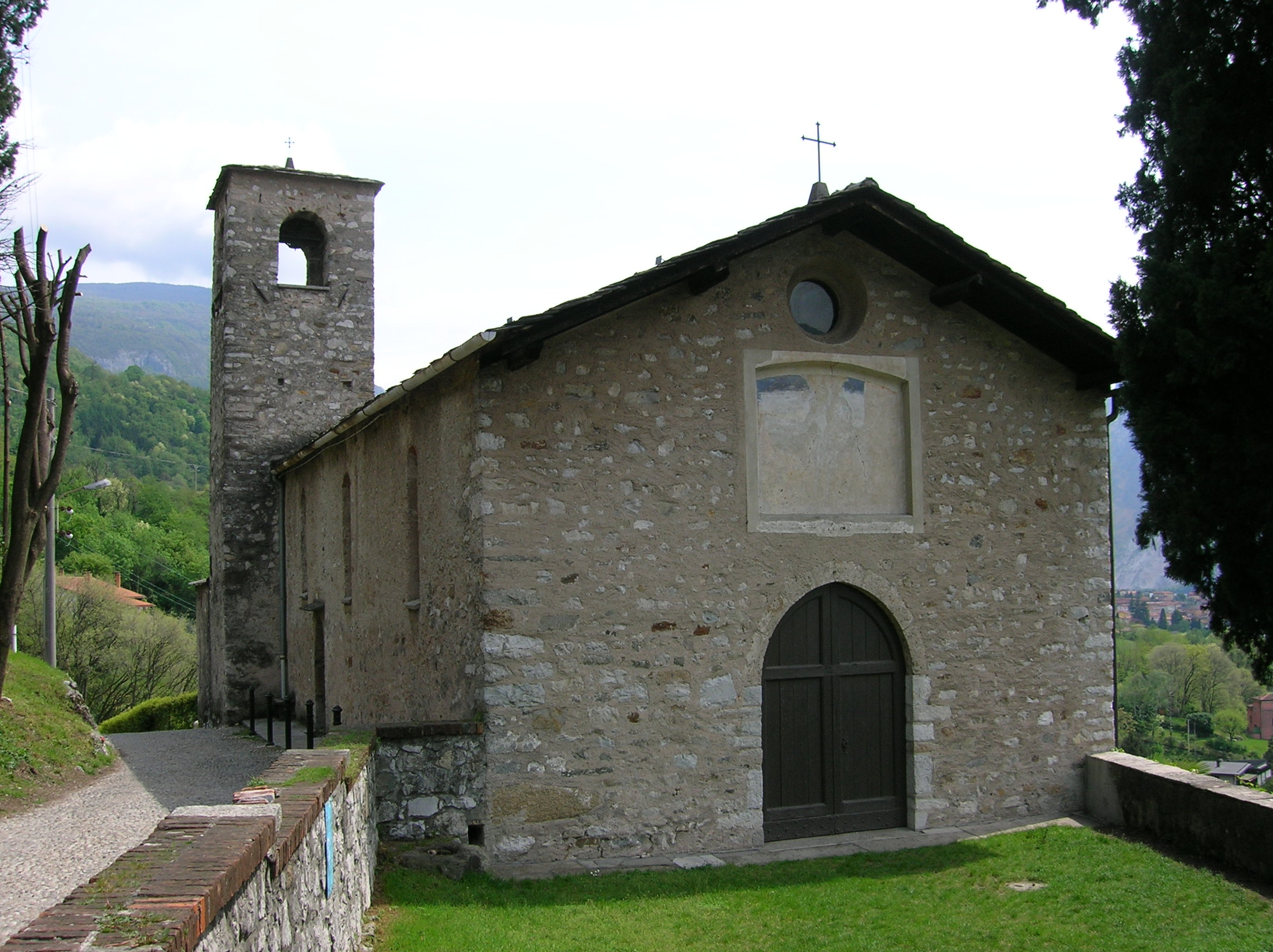 chiesa di San Giorgio a Mandello del Lario